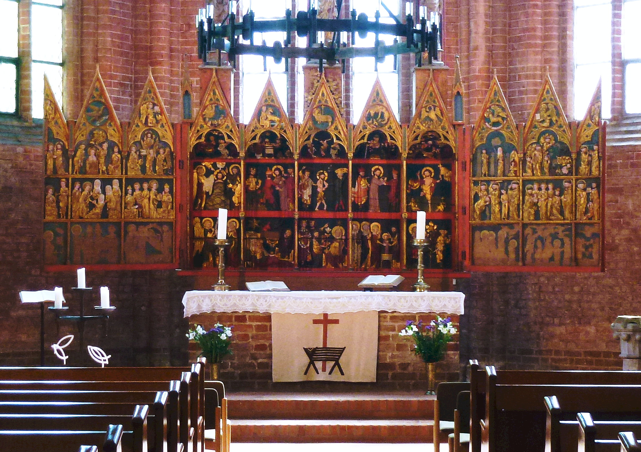 Kloster Cismar, Altarschrein